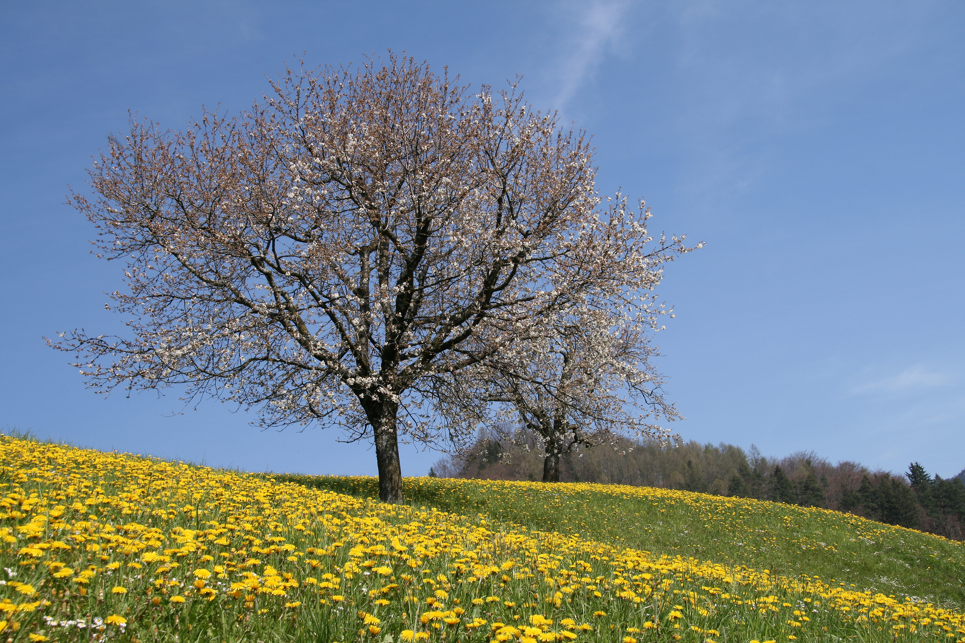 Habitat des Gewöhnlichen Löwenzahn (Taraxacum sect. Ruderalia) Er stellt eine Gruppe äußerst ähnlicher und stark verwandter Pflanzen in der Gattung des Löwenzahn´s (Taraxacum) aus der Familie der Korbblütler (Asteraceae) dar. Gesehen im Ortsteil Halden von Weiler in Vorarlberg.